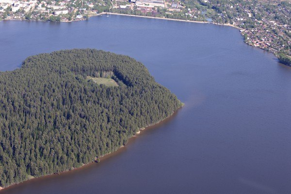 Очерский пруд: Очёрский район, Пермский край This image is related to the protected area of Russia number 5910302